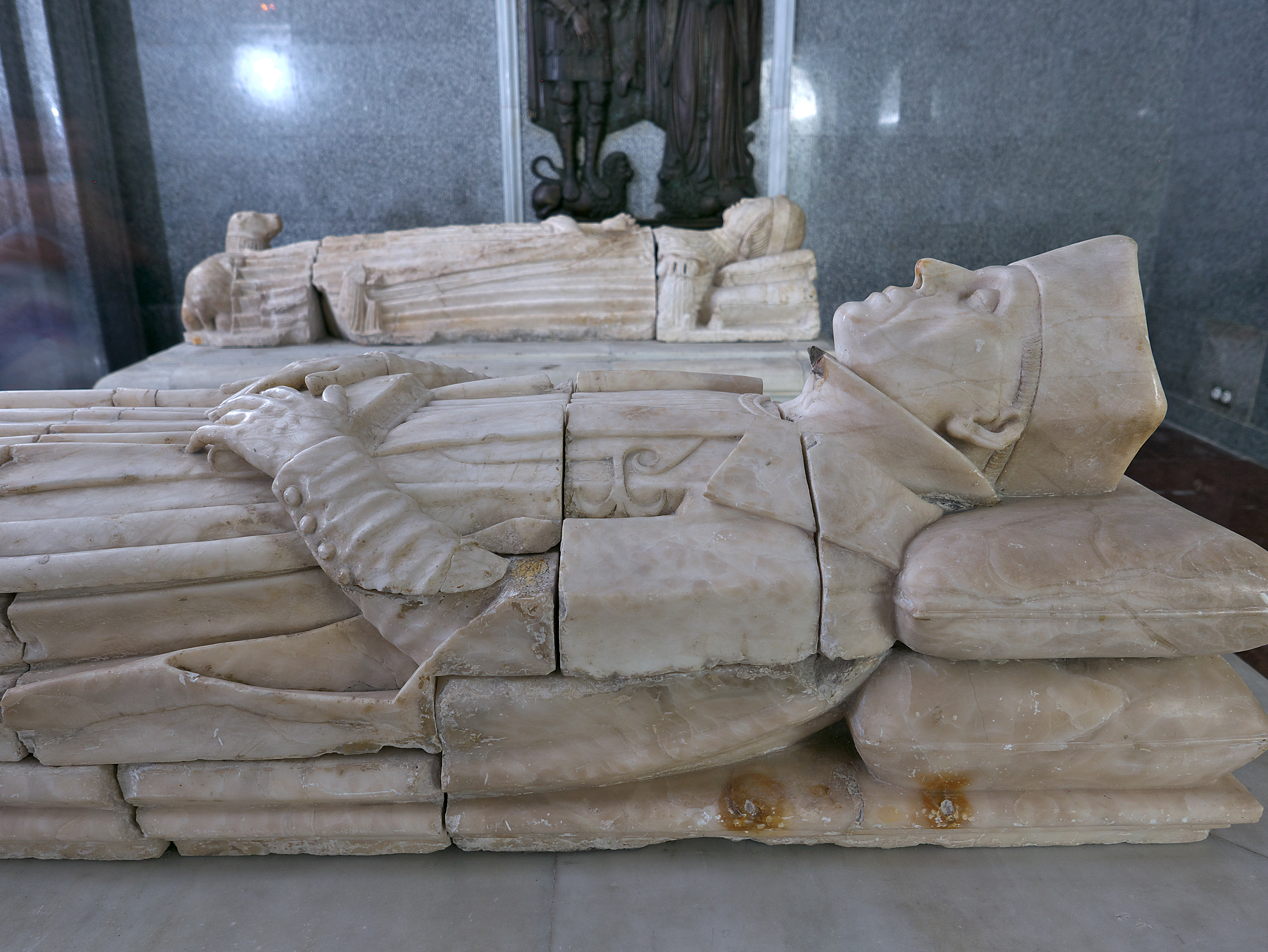 Detalle de la figura yacente (1606) de Benito Arias Montano.